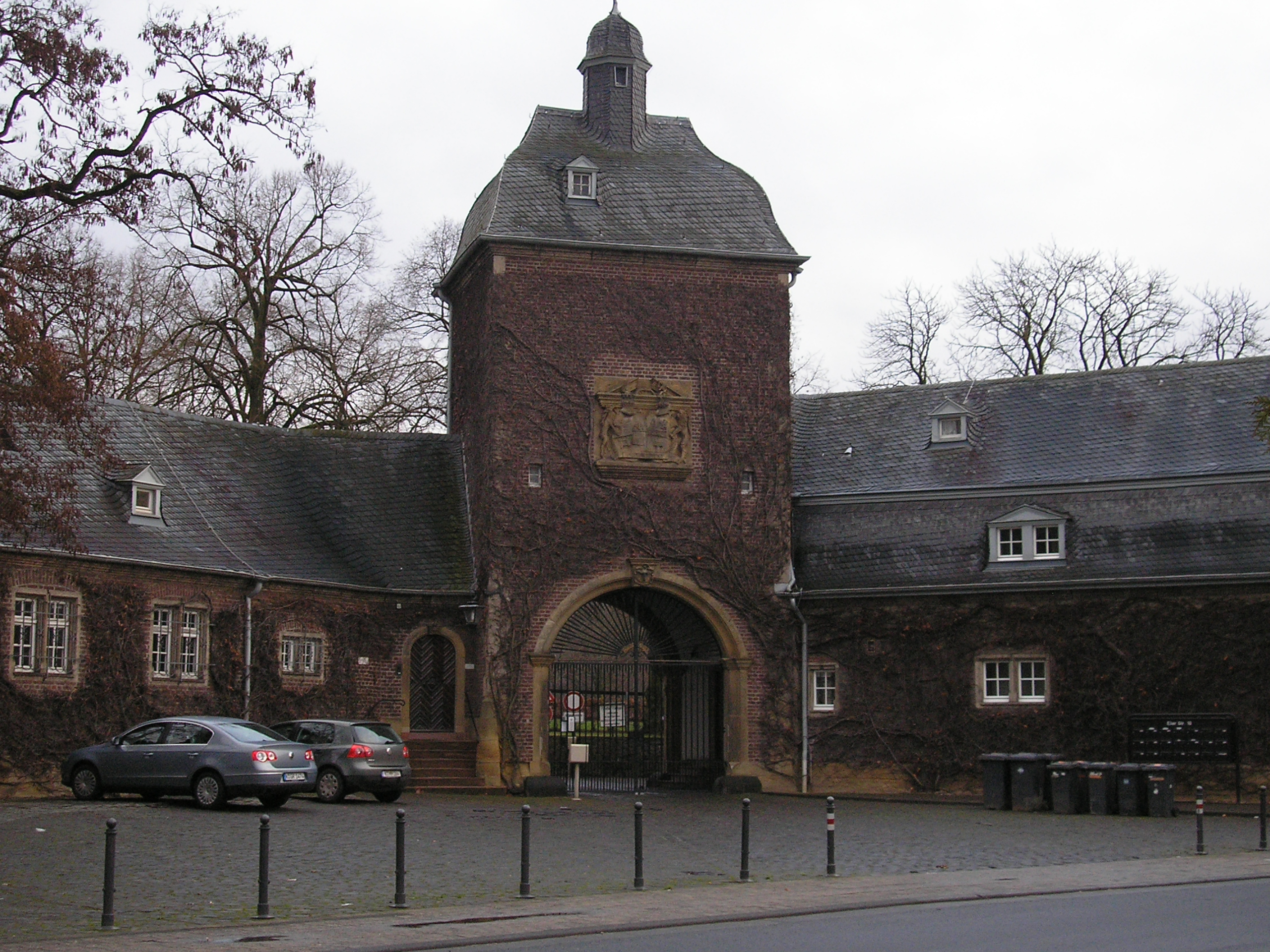 Torhaus des Gestüts Röttgen mit Rentamt, Eiler Strasse 10.